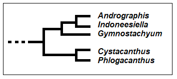 Andrographideae_-_Cladogramma_della_tribù